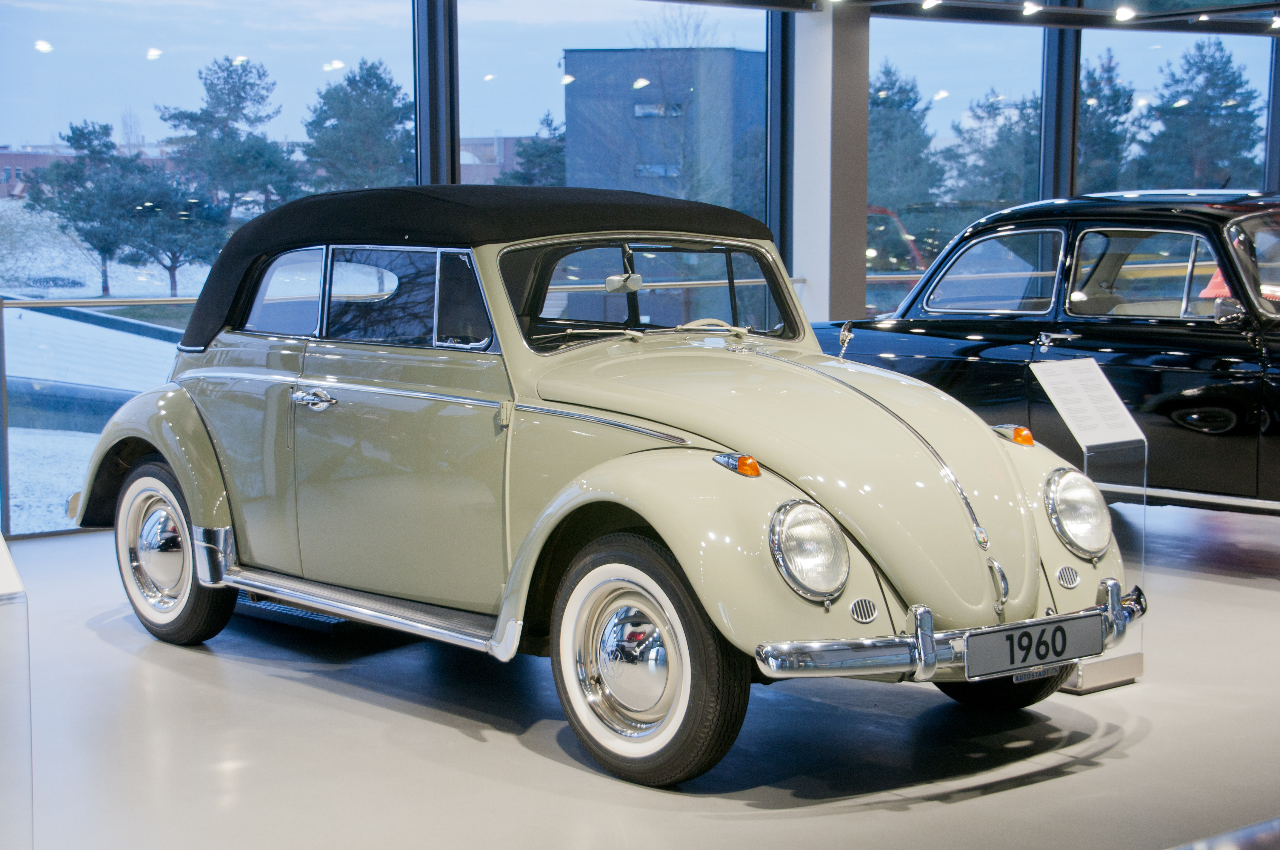 Autostadt Wolfsburg